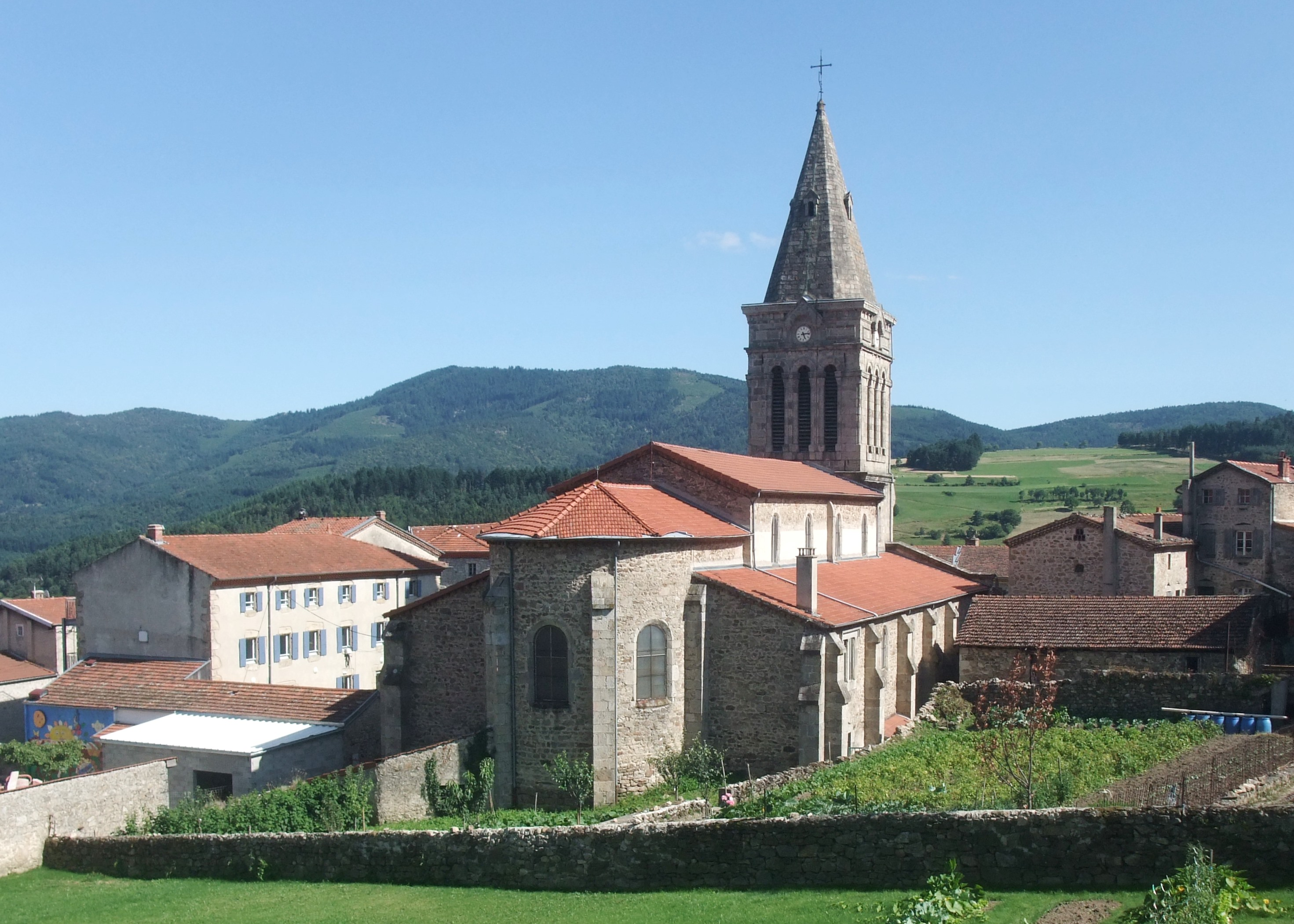 Vanosc église nord rec